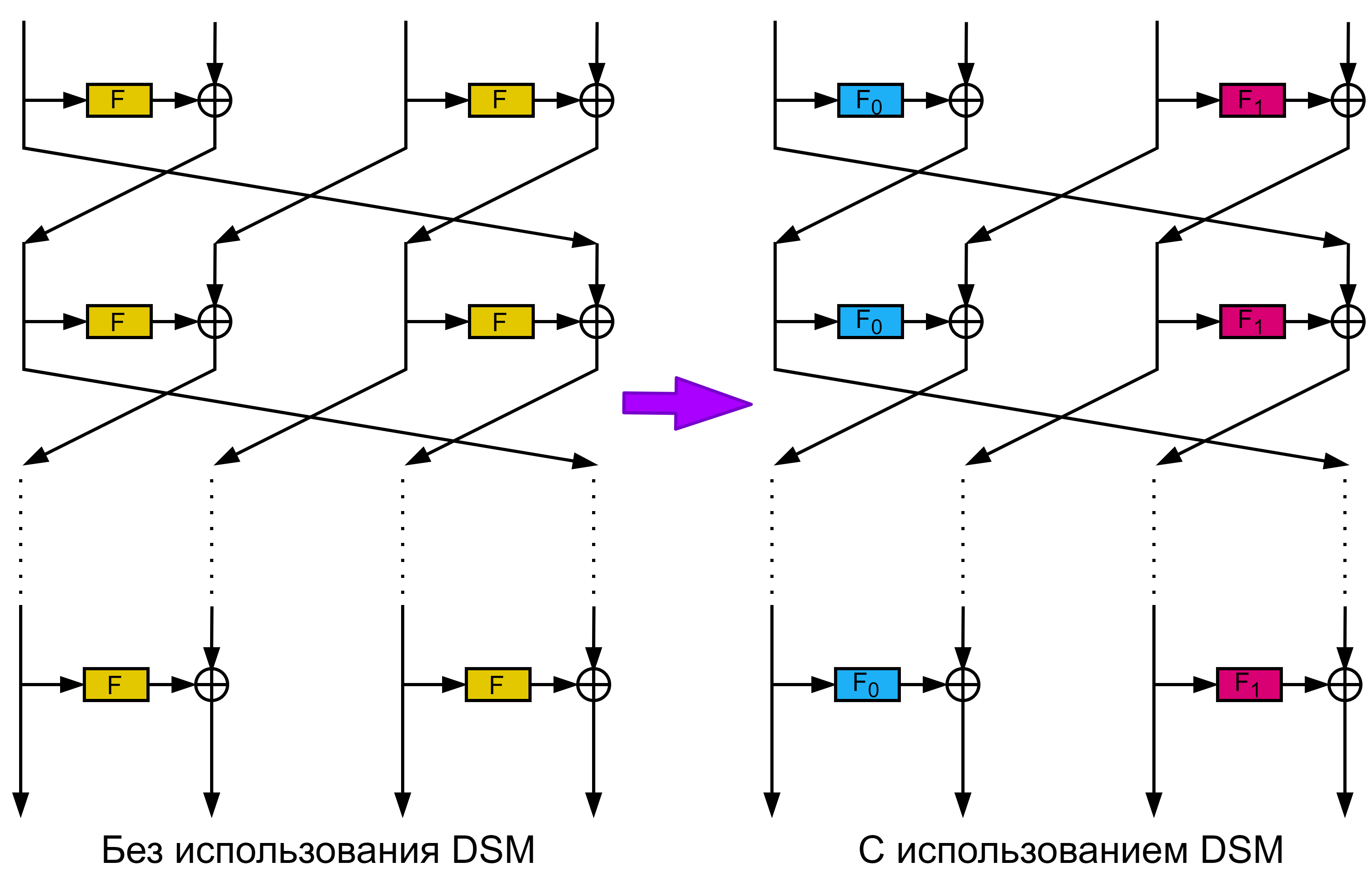 Применение DSM в обобщенной структуре Фейстеля для алгоритме CLEFIA